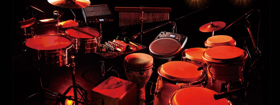 Set di Percussioni.